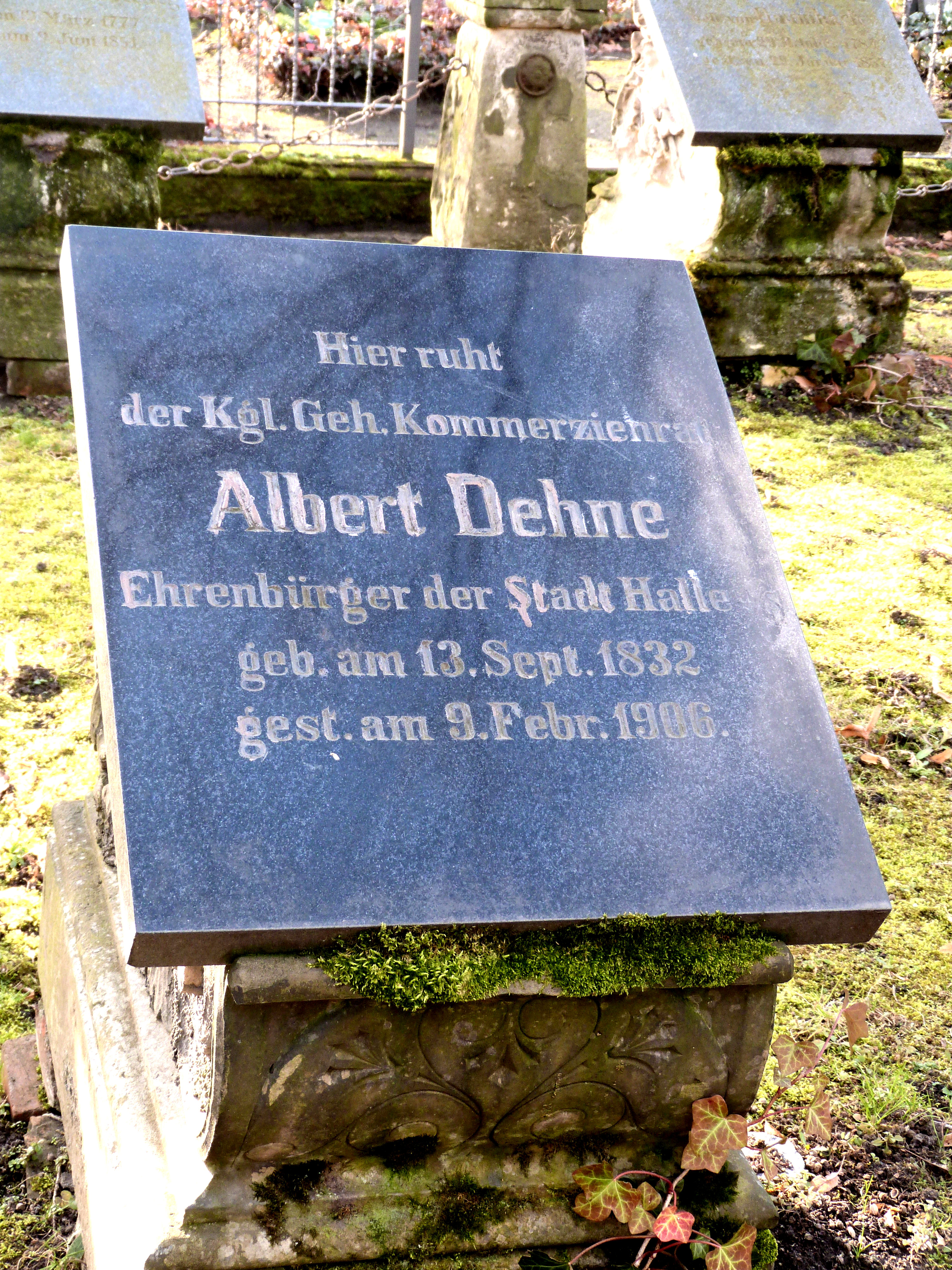 Grab des Industriellen und halleschen Ehrenbürgers Albert Dehne (1832-1906), Stadtgottesacker Halle (Saaale)